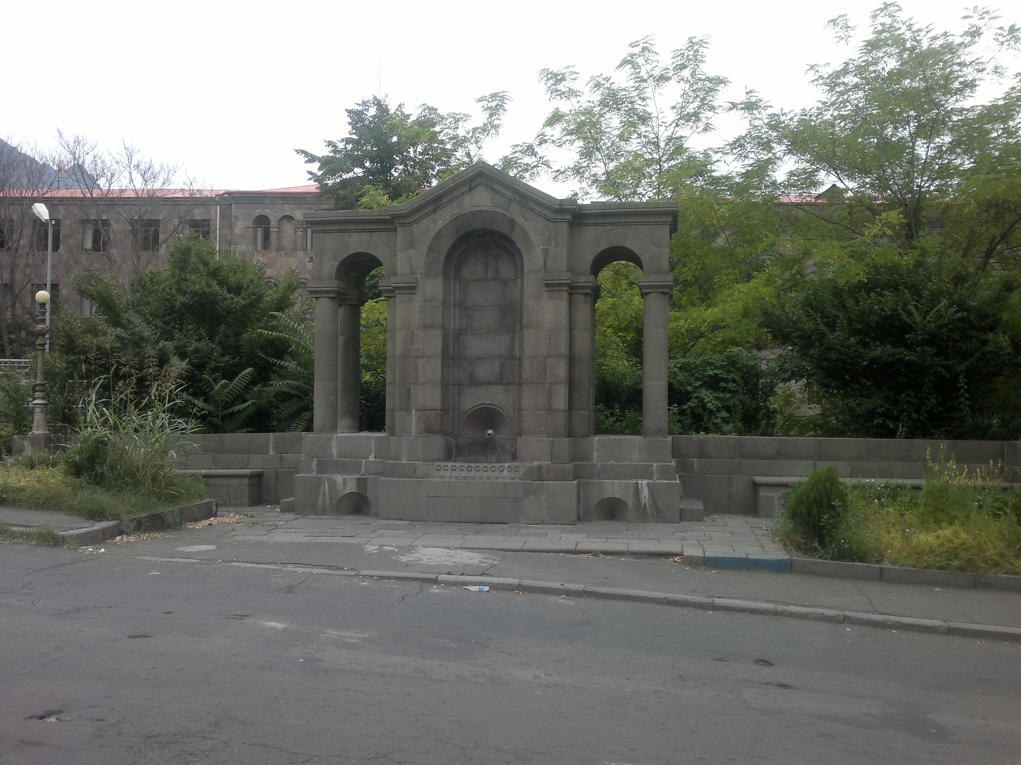 Հուշակոթող երկրորդ համաշխարհայինում զոհվածներին Ալավերդու ձորում 2/25